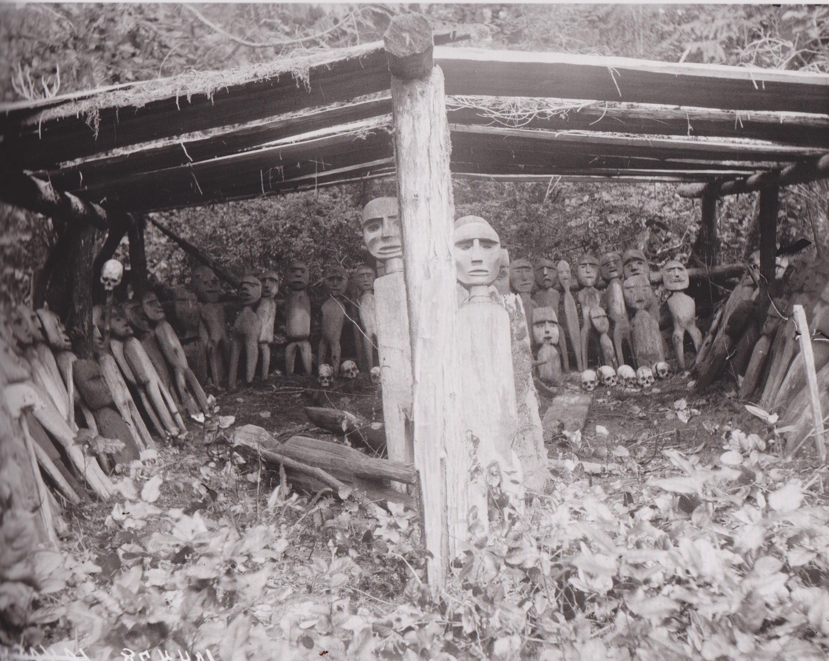 Yuquot Whalers' Shrine aus dem Ort Yuquot auf der Vancouver-Insel, Kanada, Pazifikküste